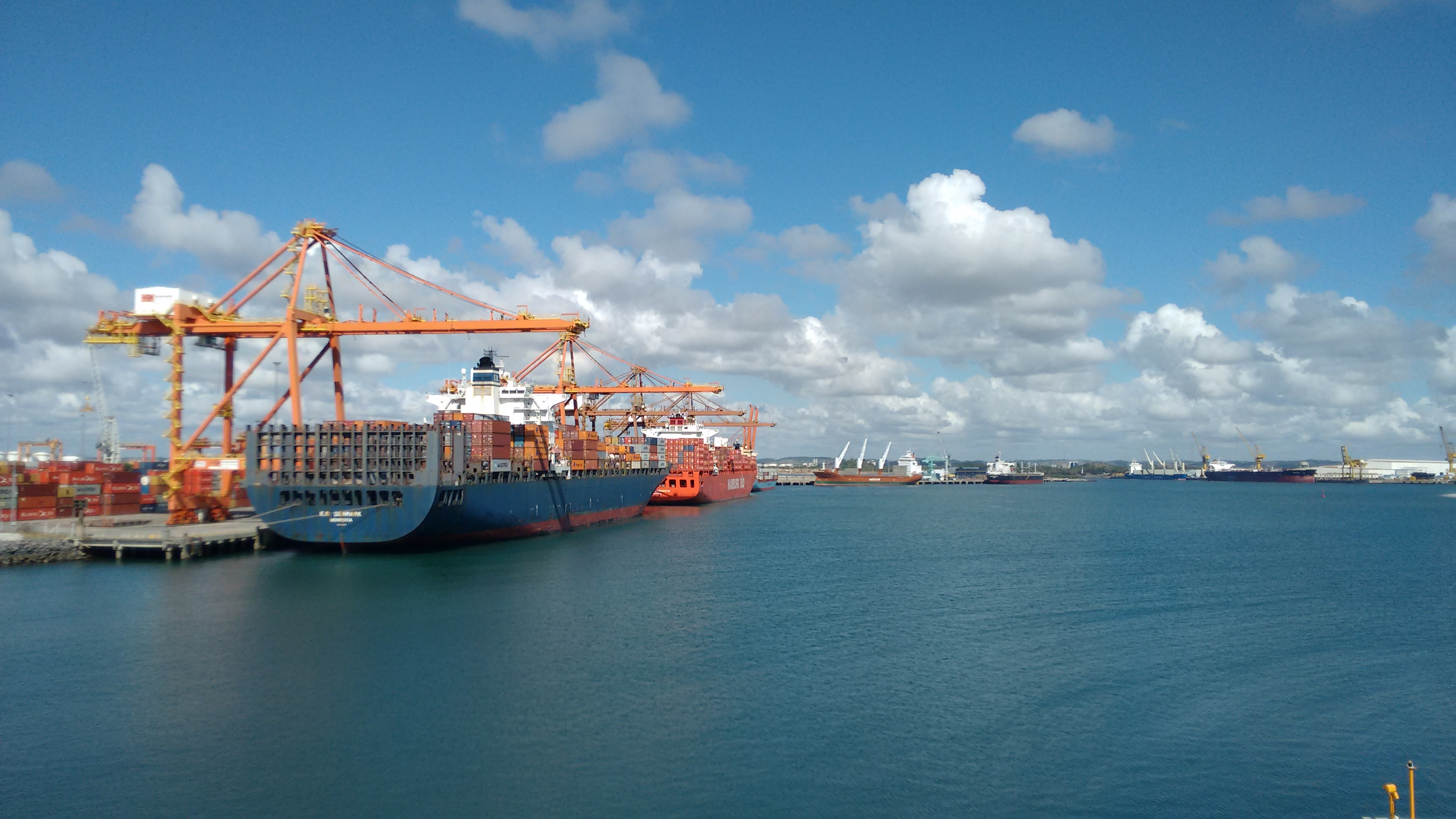 IMG_20170223_082413499 (002)